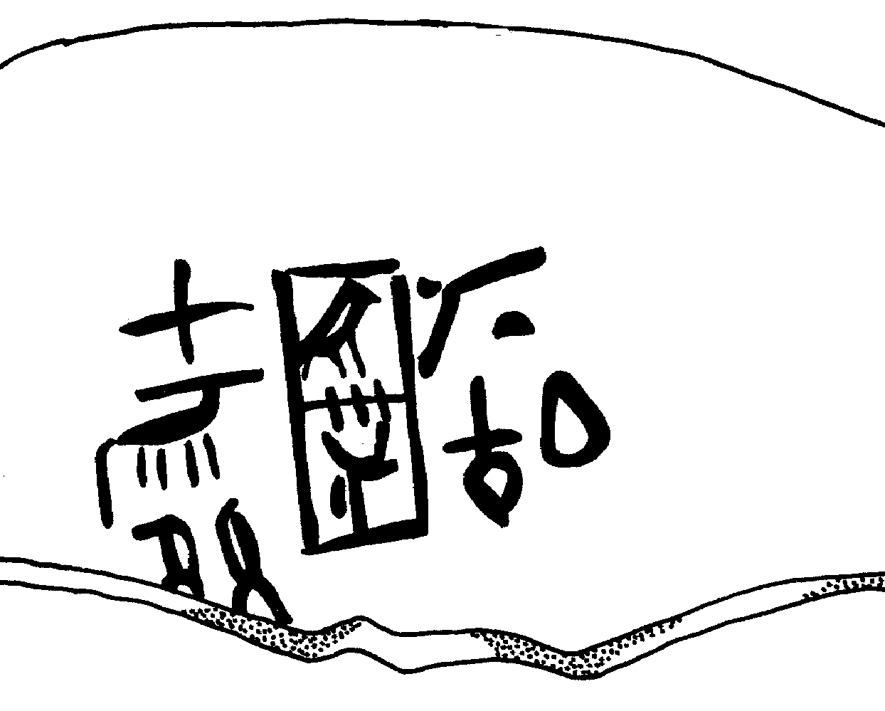 Scherbe aud der 2. Dynastie, welche König Sa zugesprochen wird